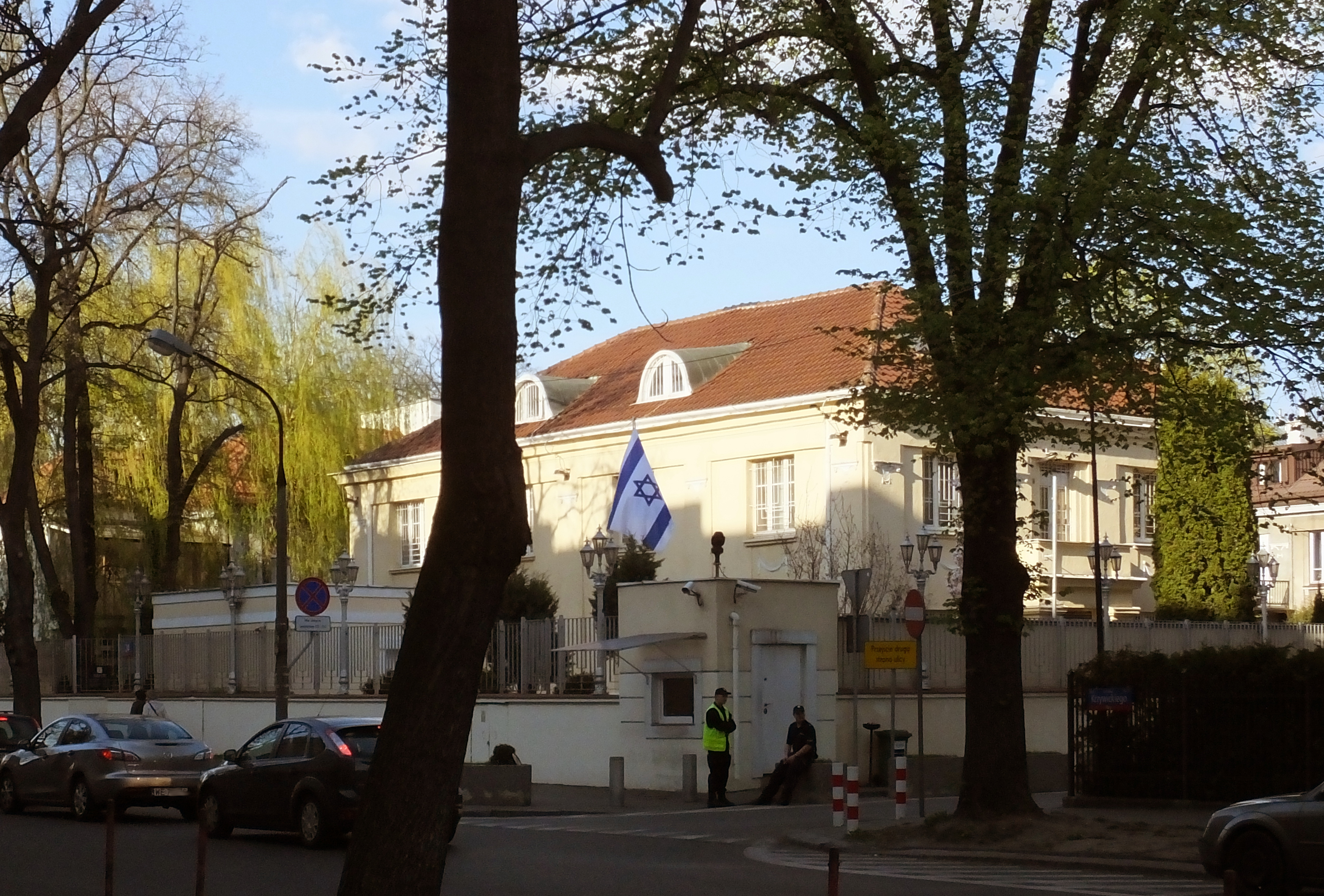 Ambasada Izraela w Warszawie, róg ul. Krzywickiego i Langiewicza